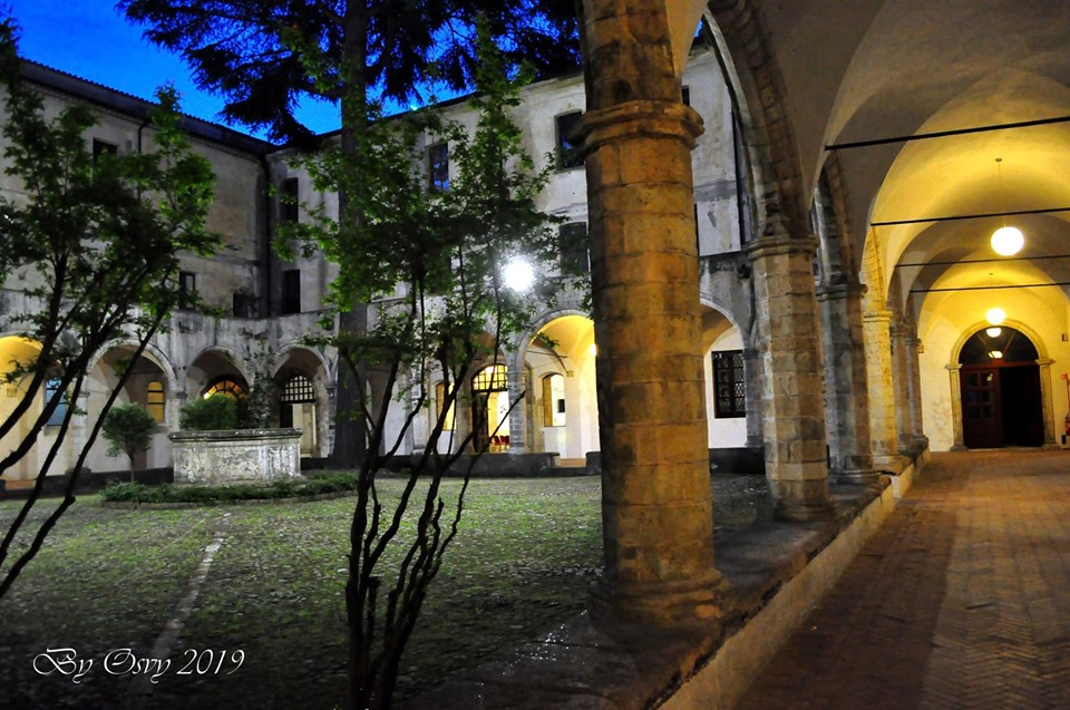 Interno del Chiostro di San Domenico nel centro antico di Cosenza